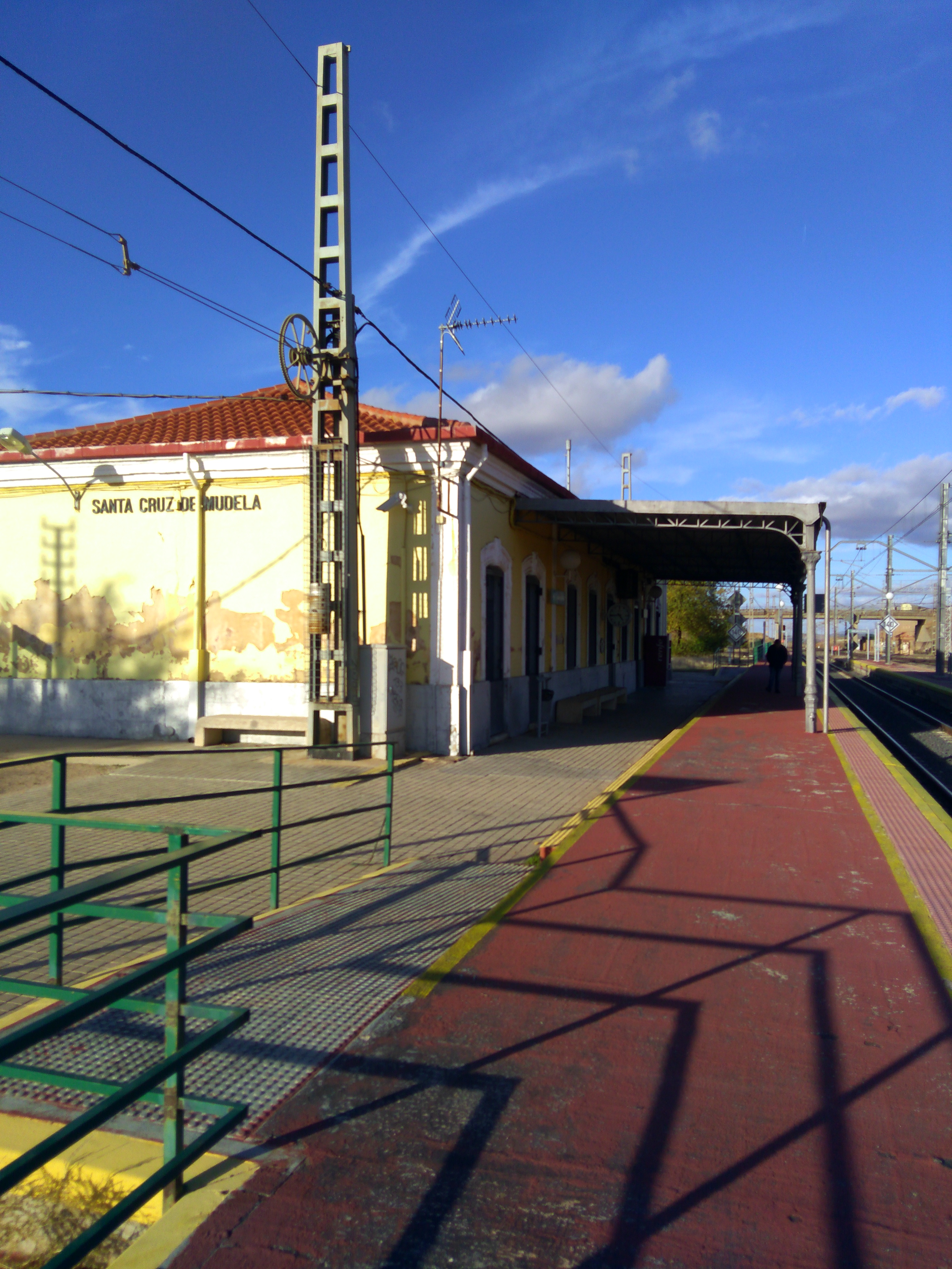 estación de ferrocarril